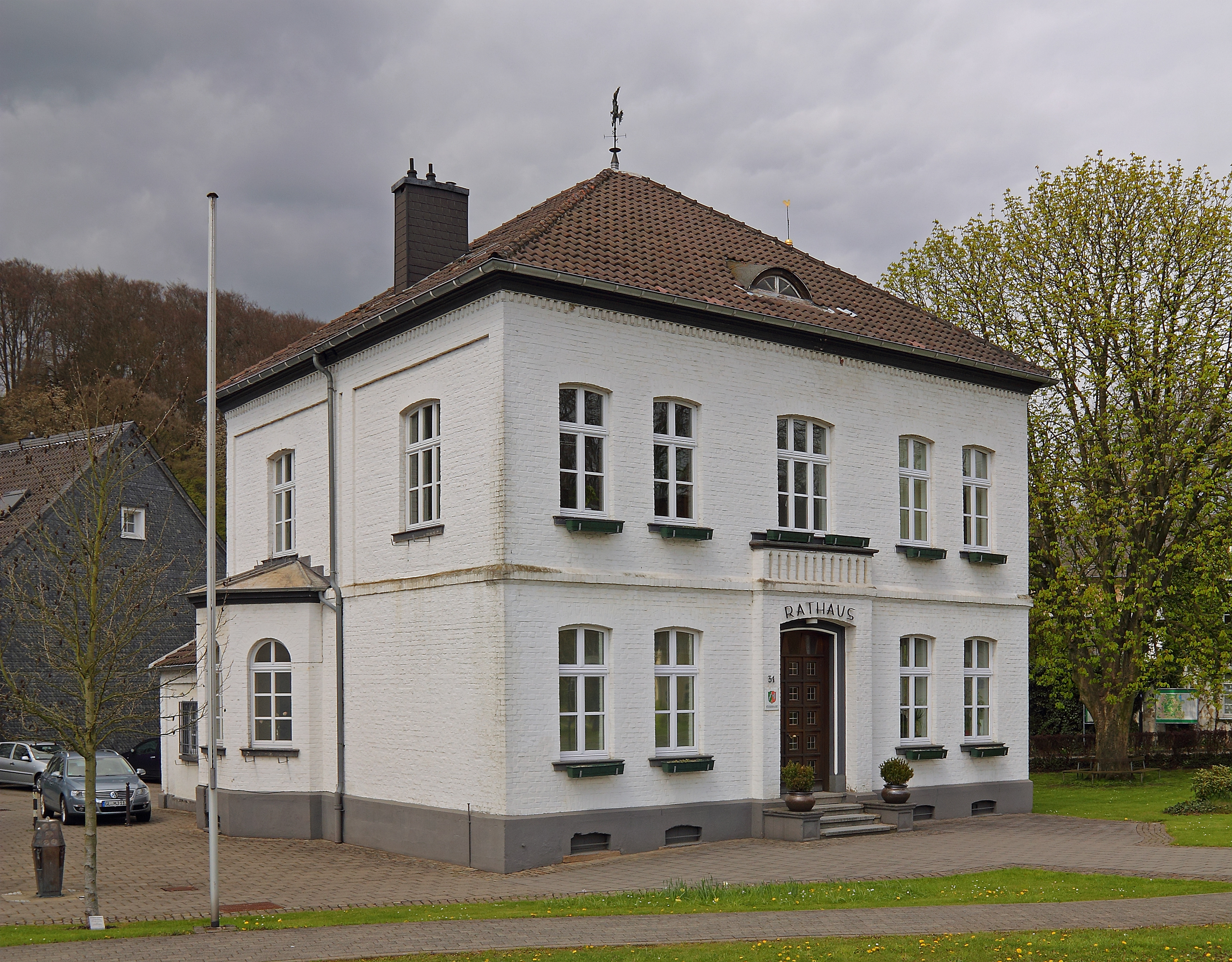 Odenthal, Altenberger Domstraße im Ortskern, Rathaus